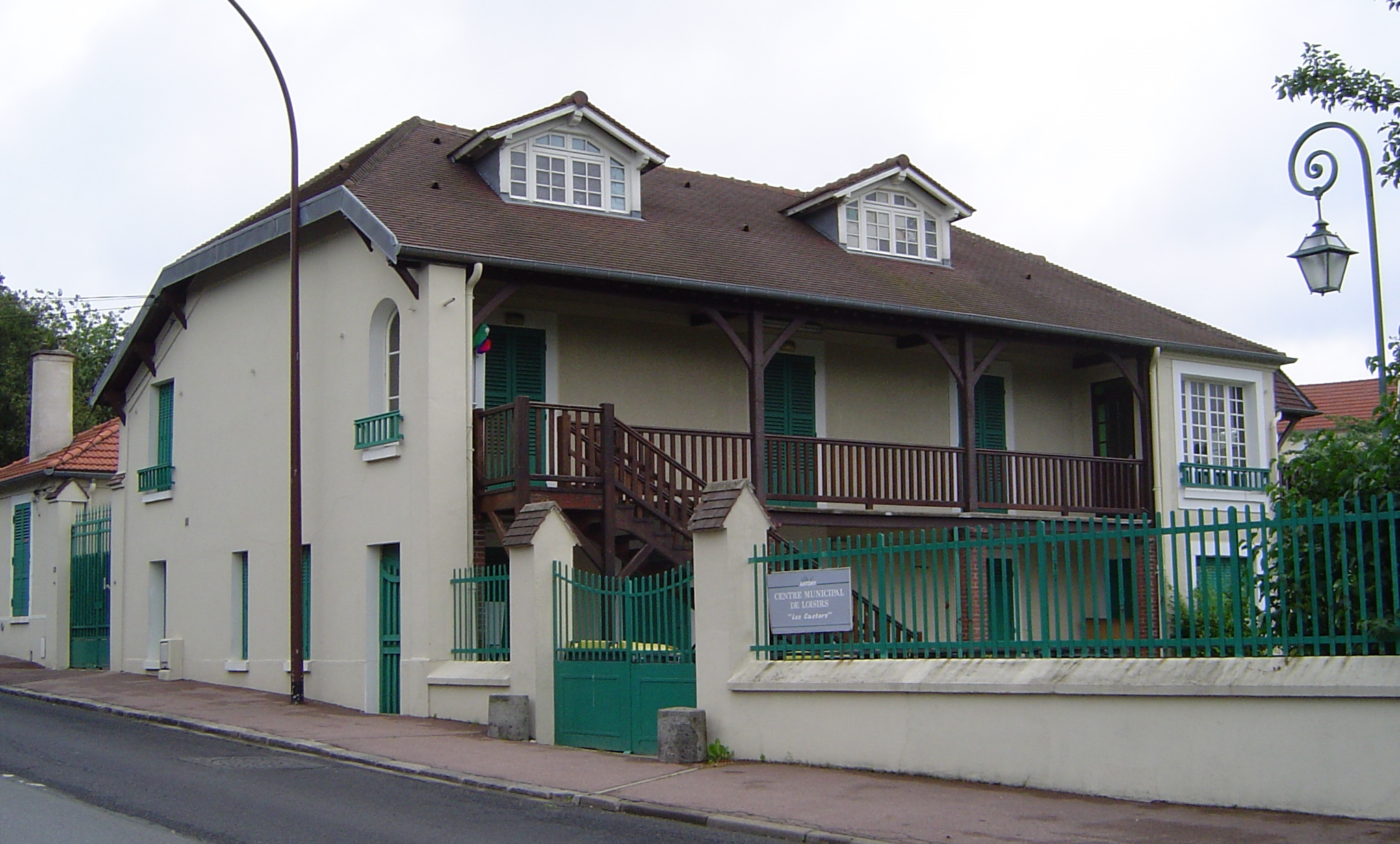 Maison natale de Louise de Vilmorin